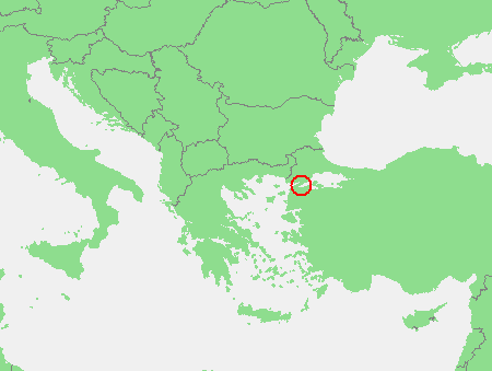 In dutch: Locatie Dardanellen.PNG